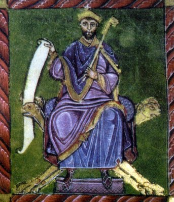 Miniatura que representa a Fruela II el Leproso, rey de León e hijo de Alfonso III el Magno, rey de Asturias.